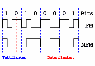 Flankenverläufe bei FM- und MFM-Codierung codiert wird das Byte 0xA1 (hexadezimal)